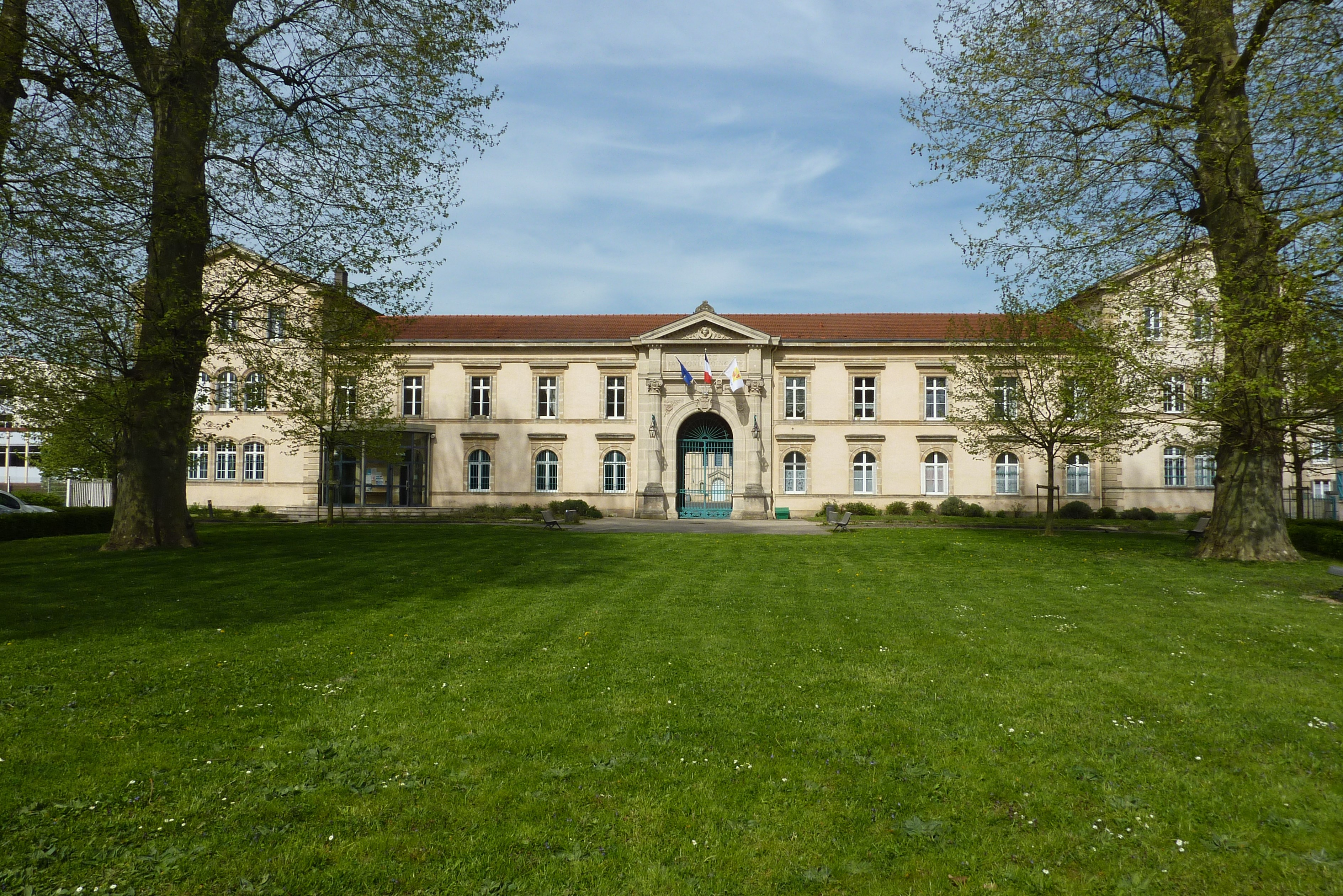 Façade avant de la partie impériale du lycée Raymond Poincaré de Bar-le-Duc.